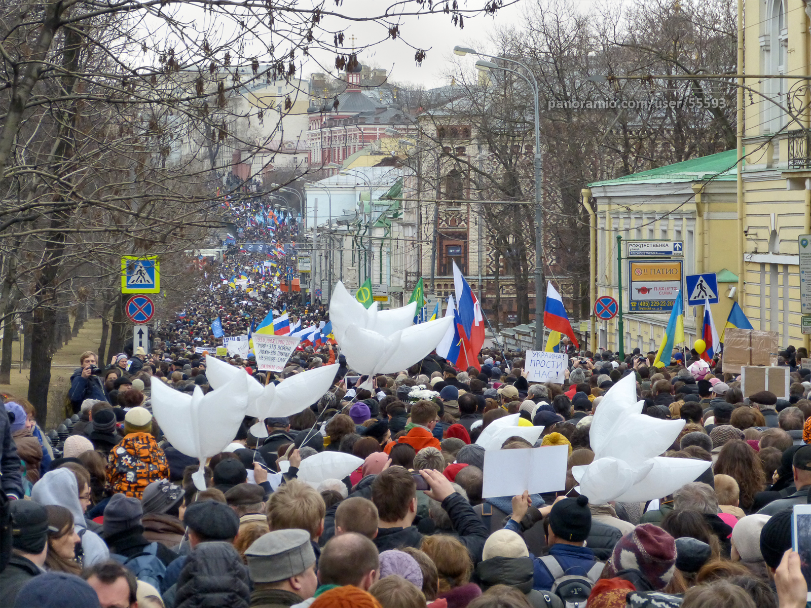 Грандиозное антипутинское шествие ЗА МИР. Москва, Бульварное кольцо, 15 марта 2014 года. По окончании шествия на проспекте Академика Сахарова состоялся митинг. К лозунгу оппозиции РОССИЯ БЕЗ ПУТИНА добавился новый лозунг: УКРАИНА БЕЗ ПУТИНА!21 сентября 2014 года прошёл ещё более многолюдный МАРШ МИРА: Category:March of Peace (2014-09-21, Moscow).